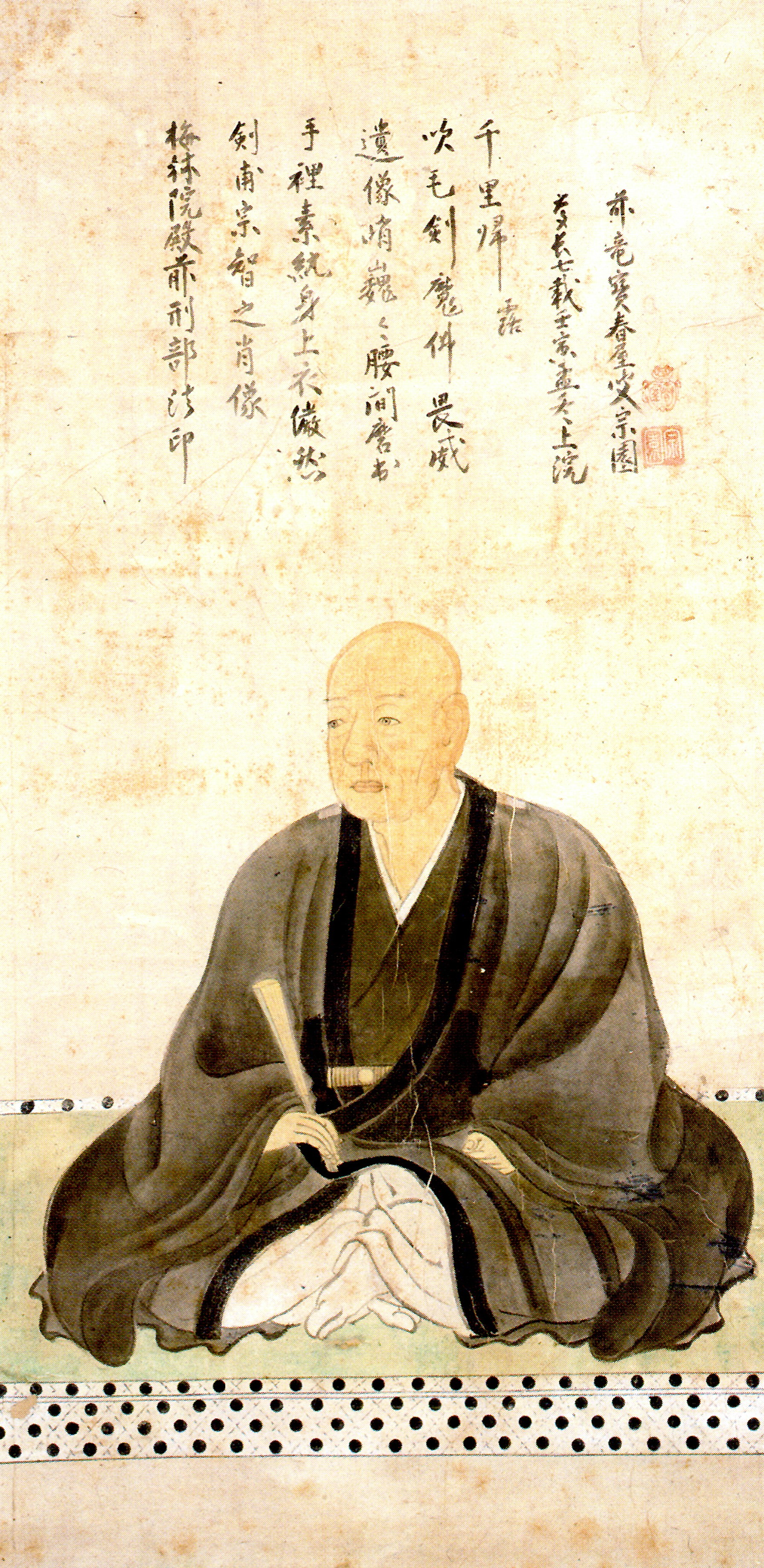 有馬則頼の肖像。